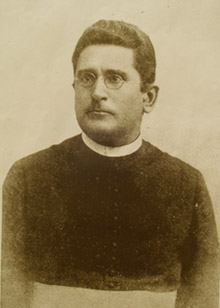 Viktor Palkovich (1850 - 1930), Římskokatolický kněz a politik maďarské národnosti.